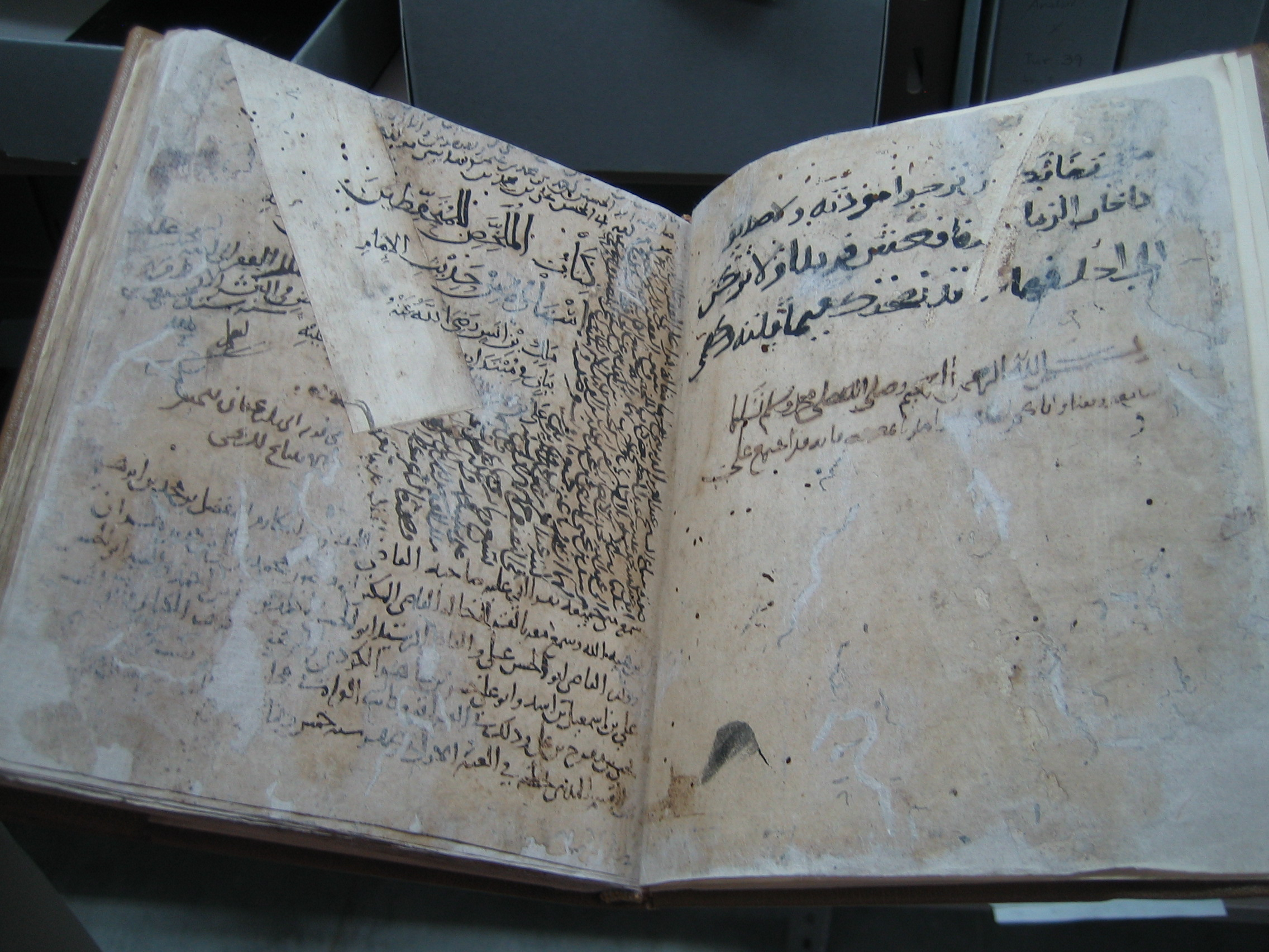 Foto de un Manuscrito de jurisprudencia isámica y sunna de Malik Ibn Annas disponible en la Biblioteca Khalidia de Jerusalem